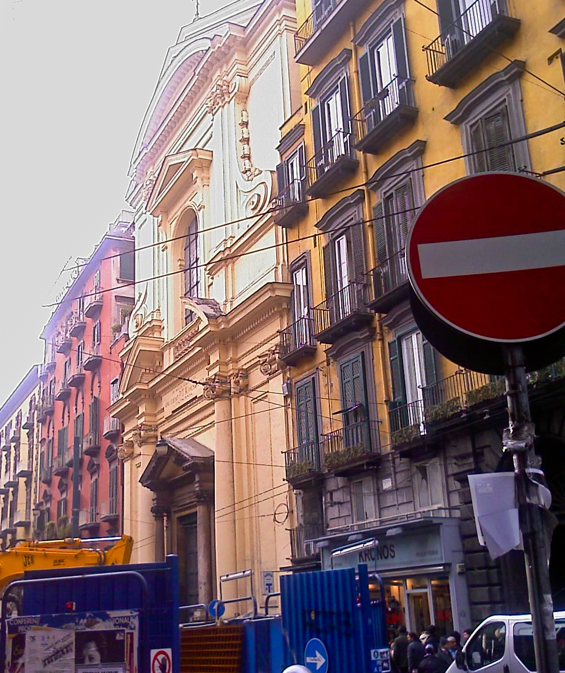 Spirito Santo (Napoli): Facade